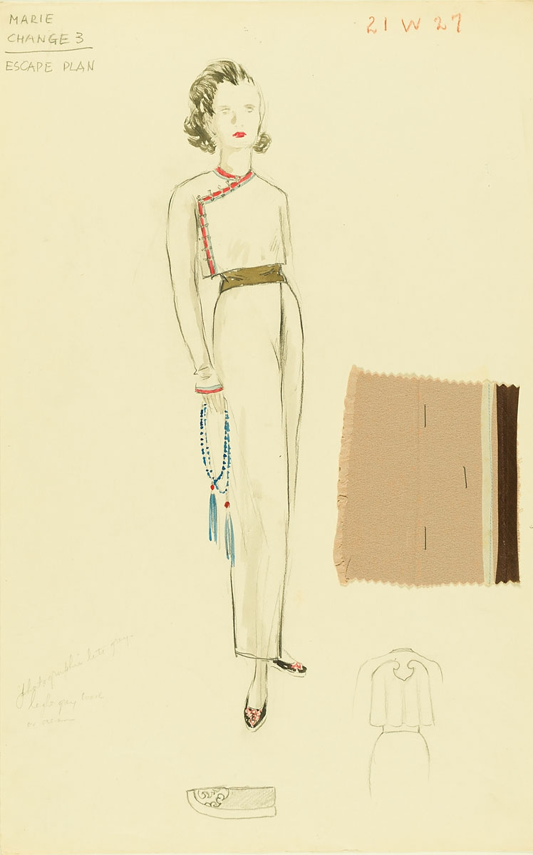 Ernst Dryden (1887–1938): Kostümentwurf für Margo Albert in dem Film "Lost Horizon" mit angefügter Stoffprobe, Museum für Kunst und Gewerbe Hamburg, Inv.nr. EG1994.3.261 (Public Domain)